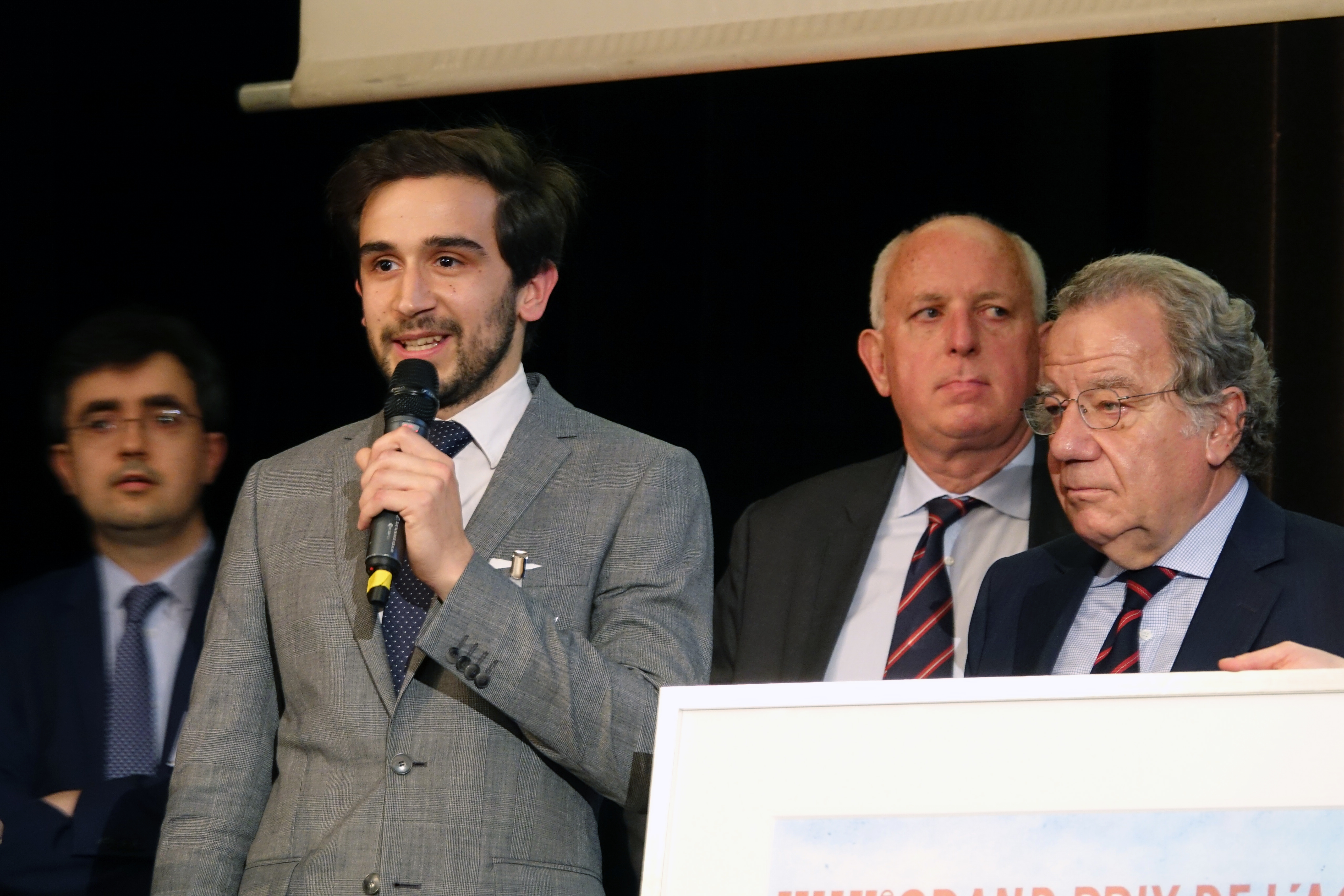 Richard de Cabrol, Aymeric de Pontbriand,Thierry Peugeot, Louis Desange